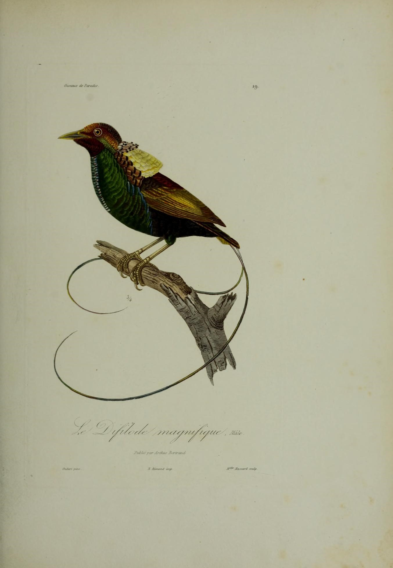 Oweaua' de raradij- \ Pliwu- du JLuiteaa isolée. J'relre puia- . X /iehwmi imp. Le./ra/ïd .